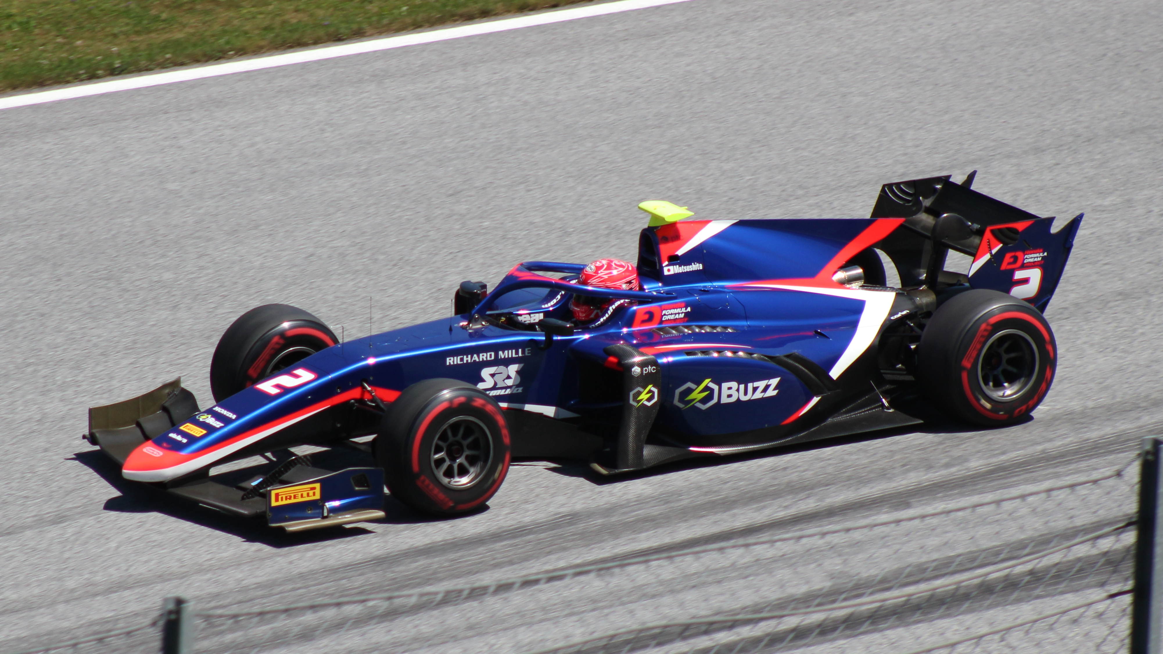 Matsushita beim Rennwochenende in Österreich 2019